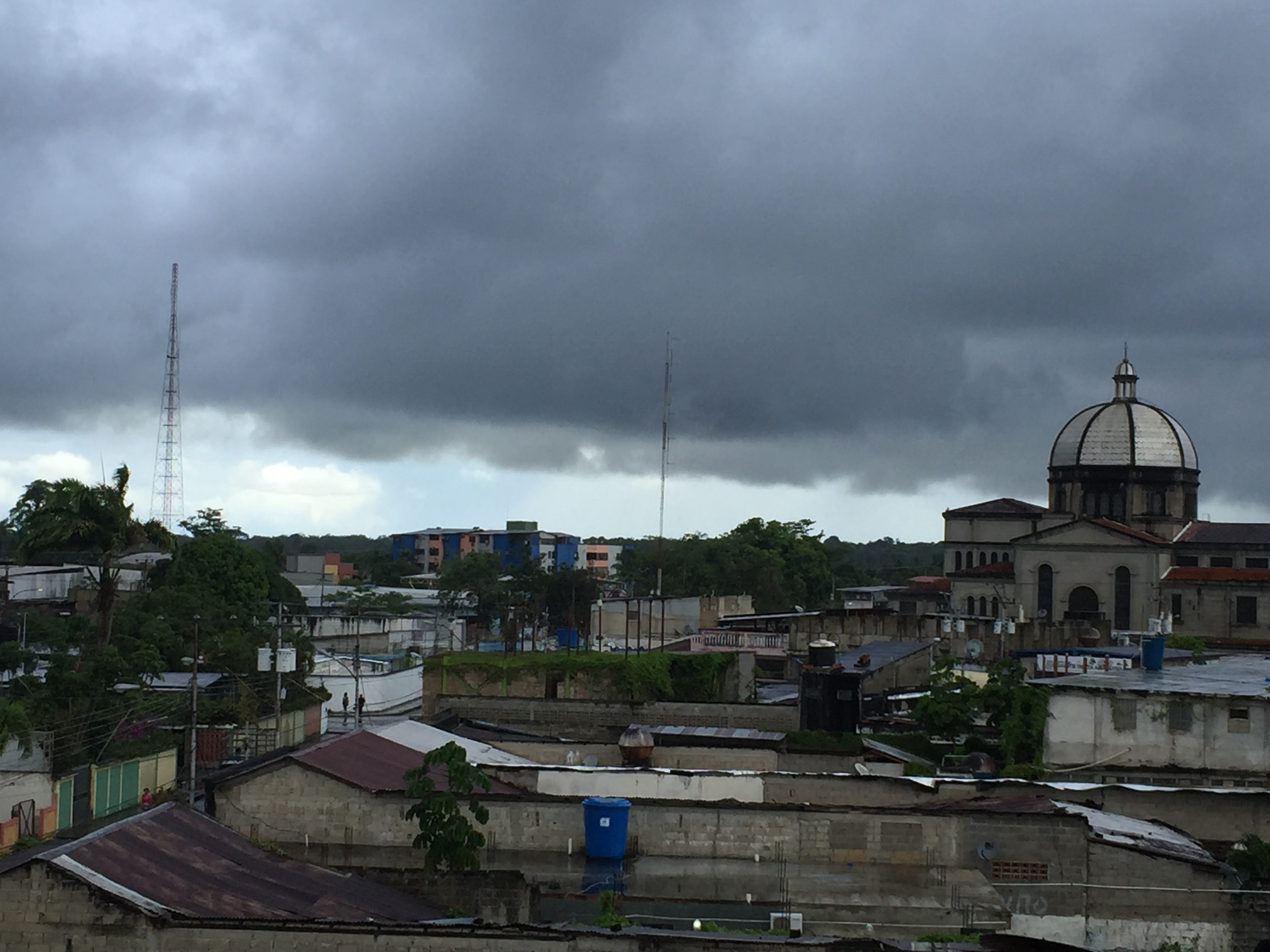 Vista panorámica de Tucupita, capital del estado Delta Amacuro.